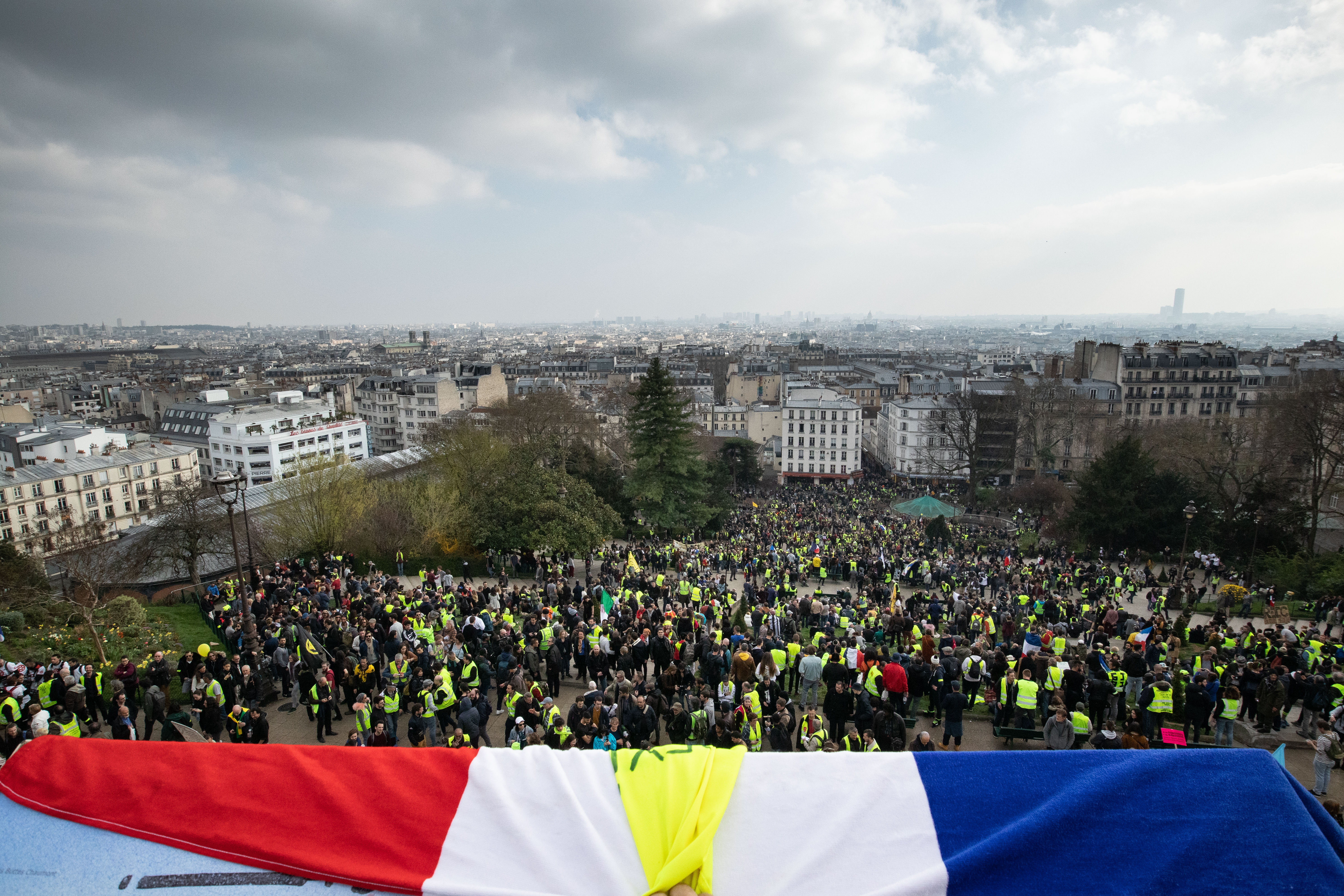 23/03/2019, Montmartre